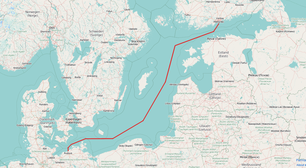 Verlauf des Unterseekabel C-Lion. Karte auf Open Street Map Basis. This map may be incomplete, and may contain errors. Don't rely solely on it for navigation.